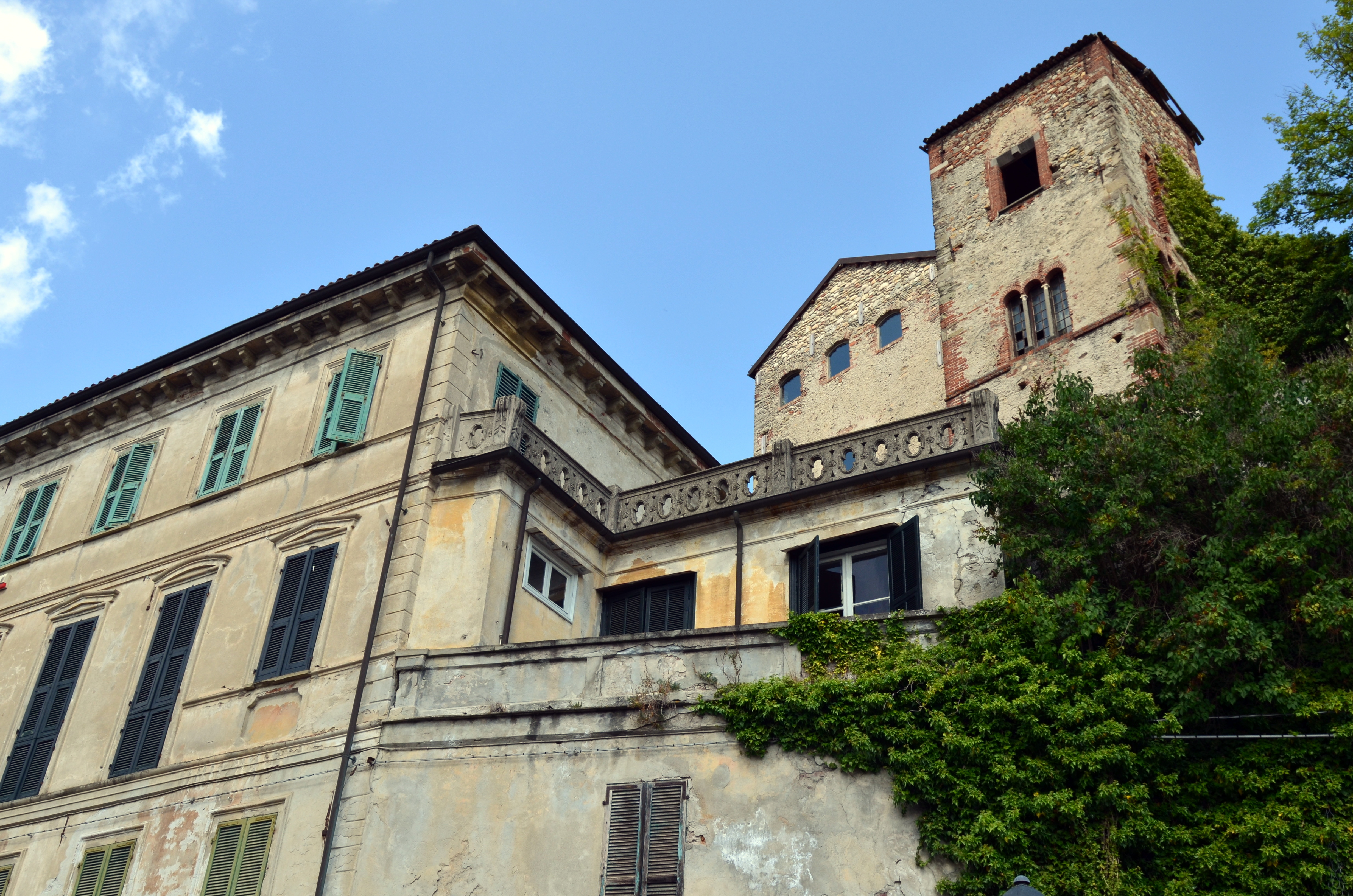 Villa Scarzella e castello dei Del Carretto, Millesimo, Liguria, Italia